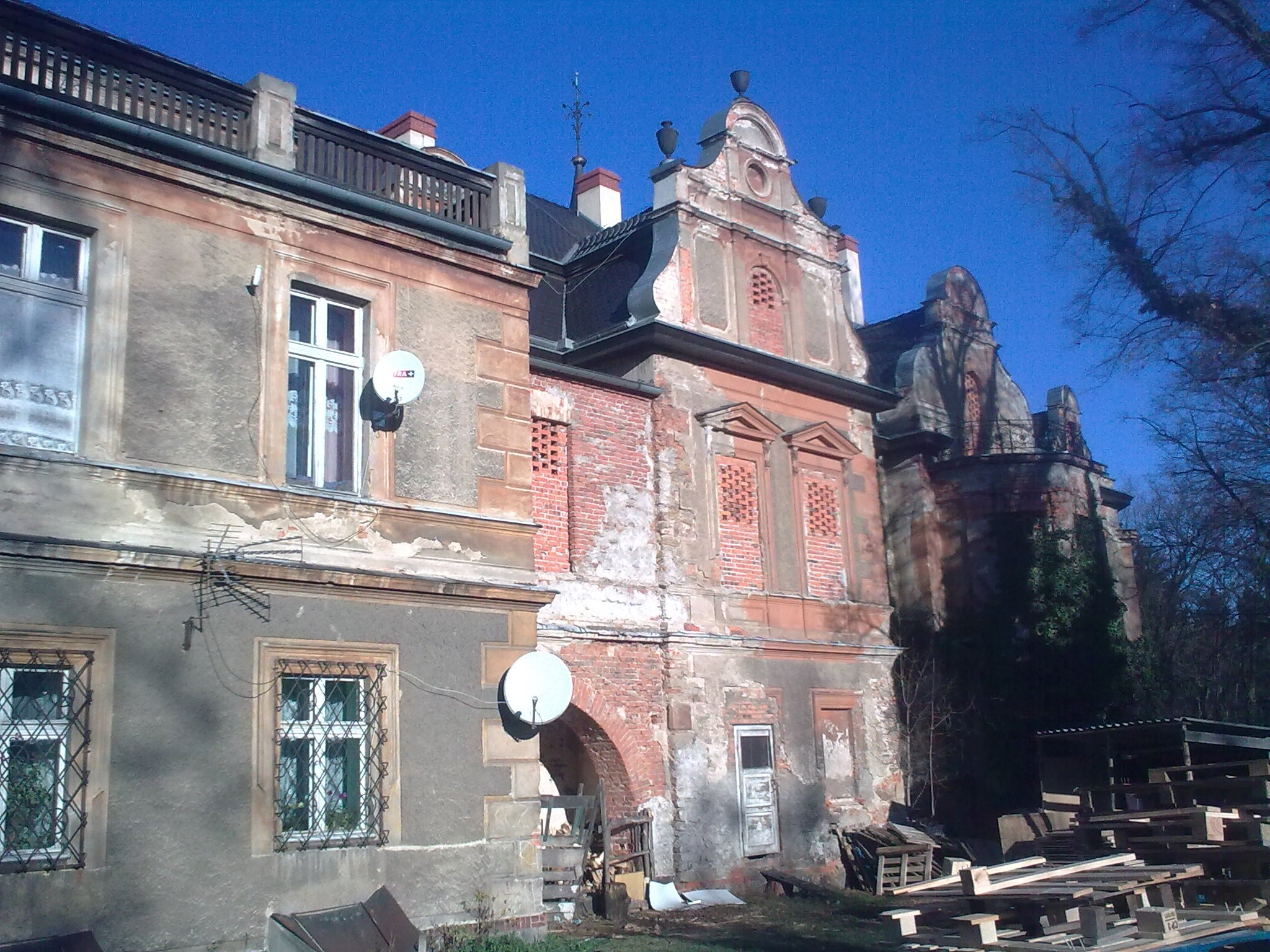 Pałac w Wiśniowej